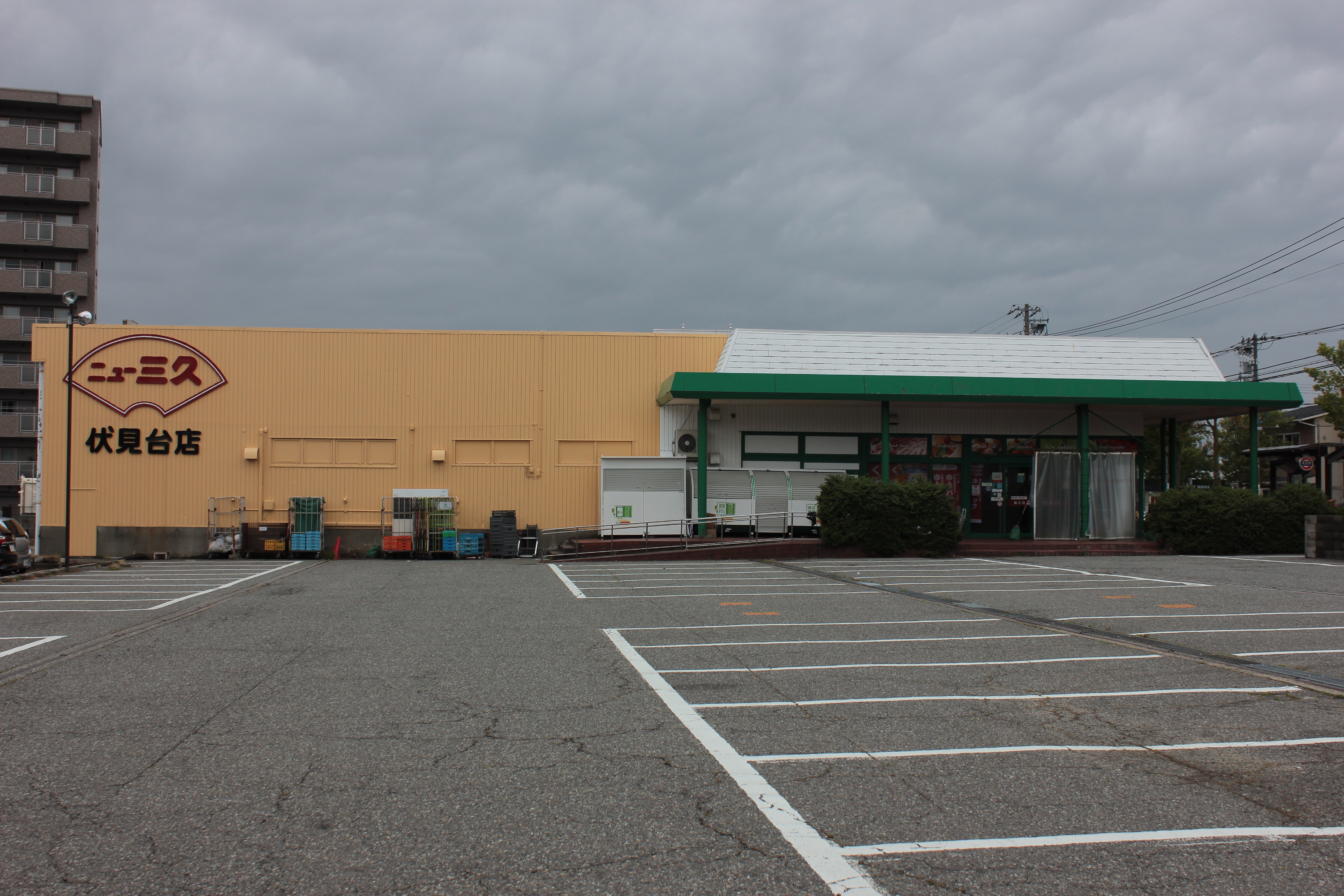 ニュー三久伏見台店（石川県金沢市） Canon EOS Kiss X5